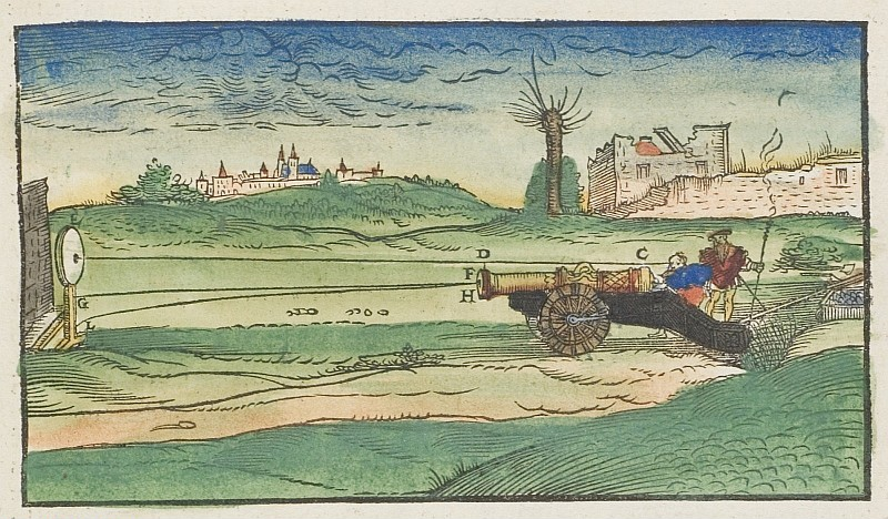 Original image description from the Deutsche Fotothek Ballistik & Kanone